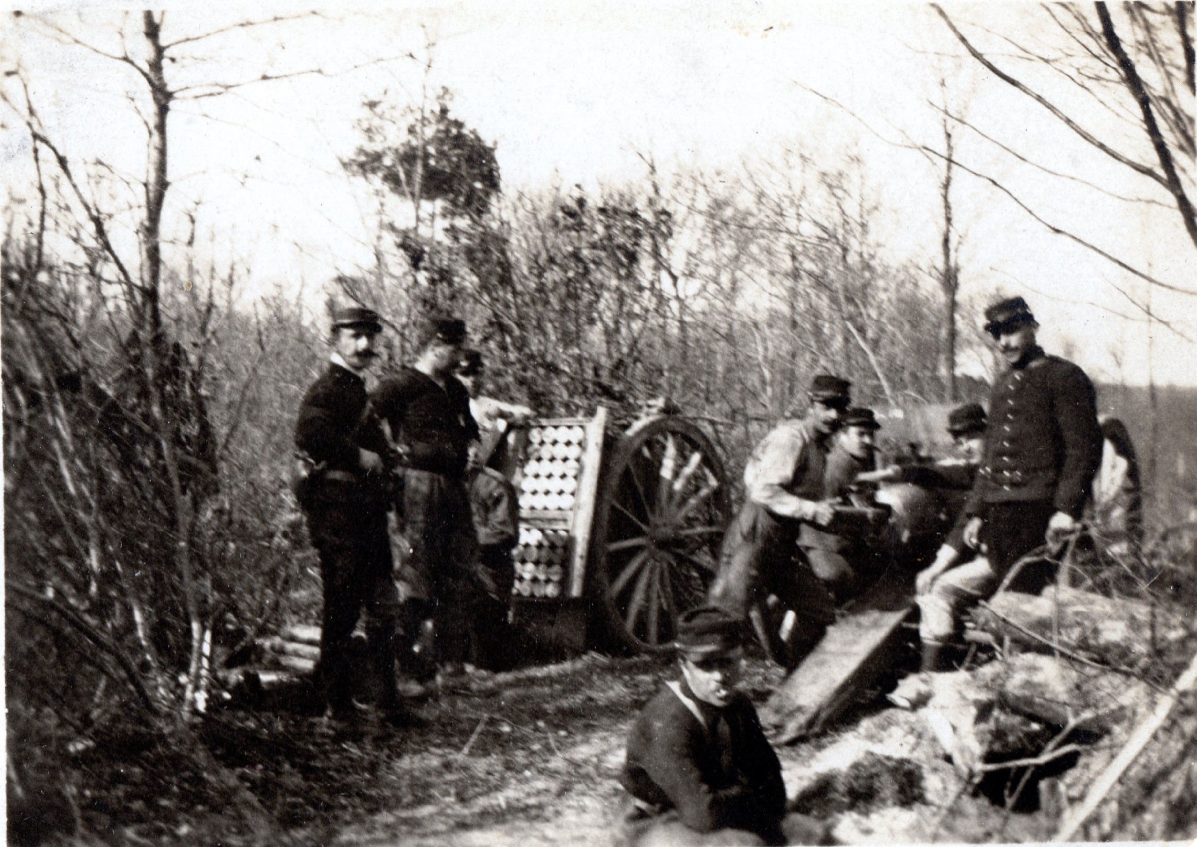 Canon de 75 en action : Batterie du 43e RAC, Bois de Gernicourt (Aisne) mars 1915